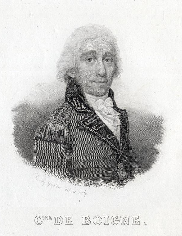 Gravure représentant le portrait du Général Comte de Boigne appelé aussi Benoît de Boigne (1751-1830. Oeuvre datant de 1835 créé par l'artiste Goutière.